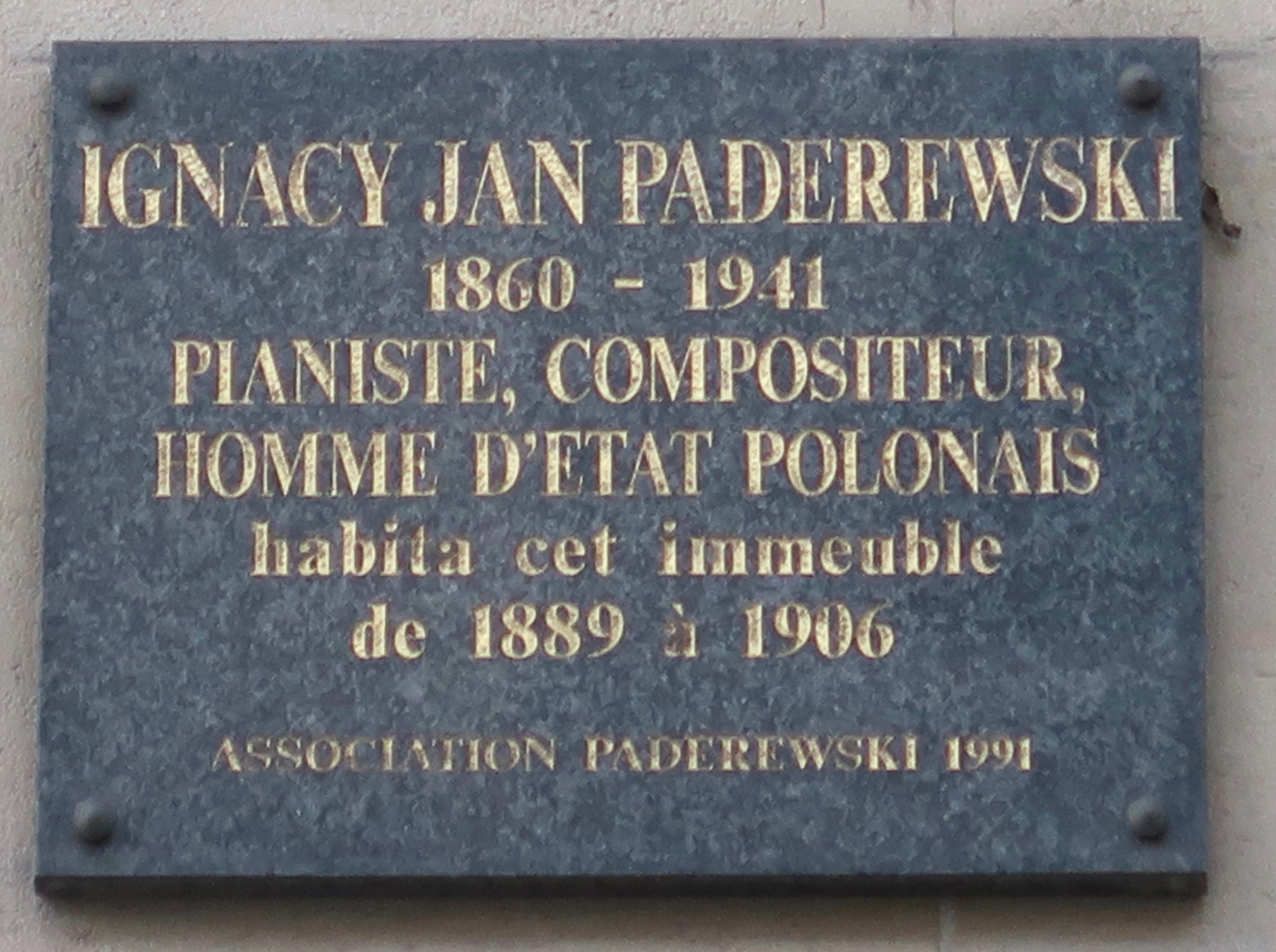 Plaque en hommage au pianiste et homme politique polonais Ignacy Paderewski n°94 avenue Victor-Hugo (Paris, 16e), où il vit entre 1889 et 1906.